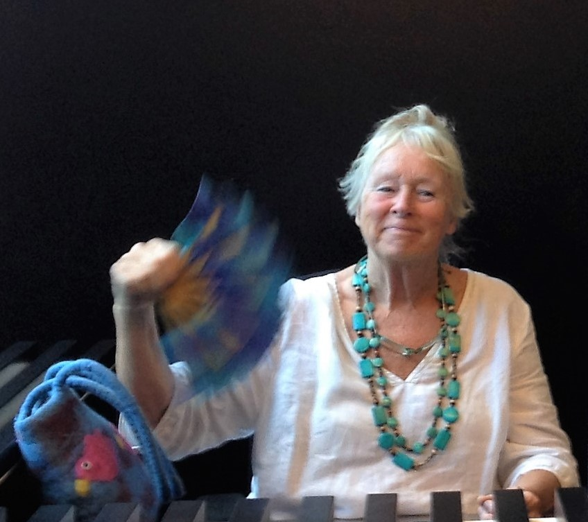 sculptress